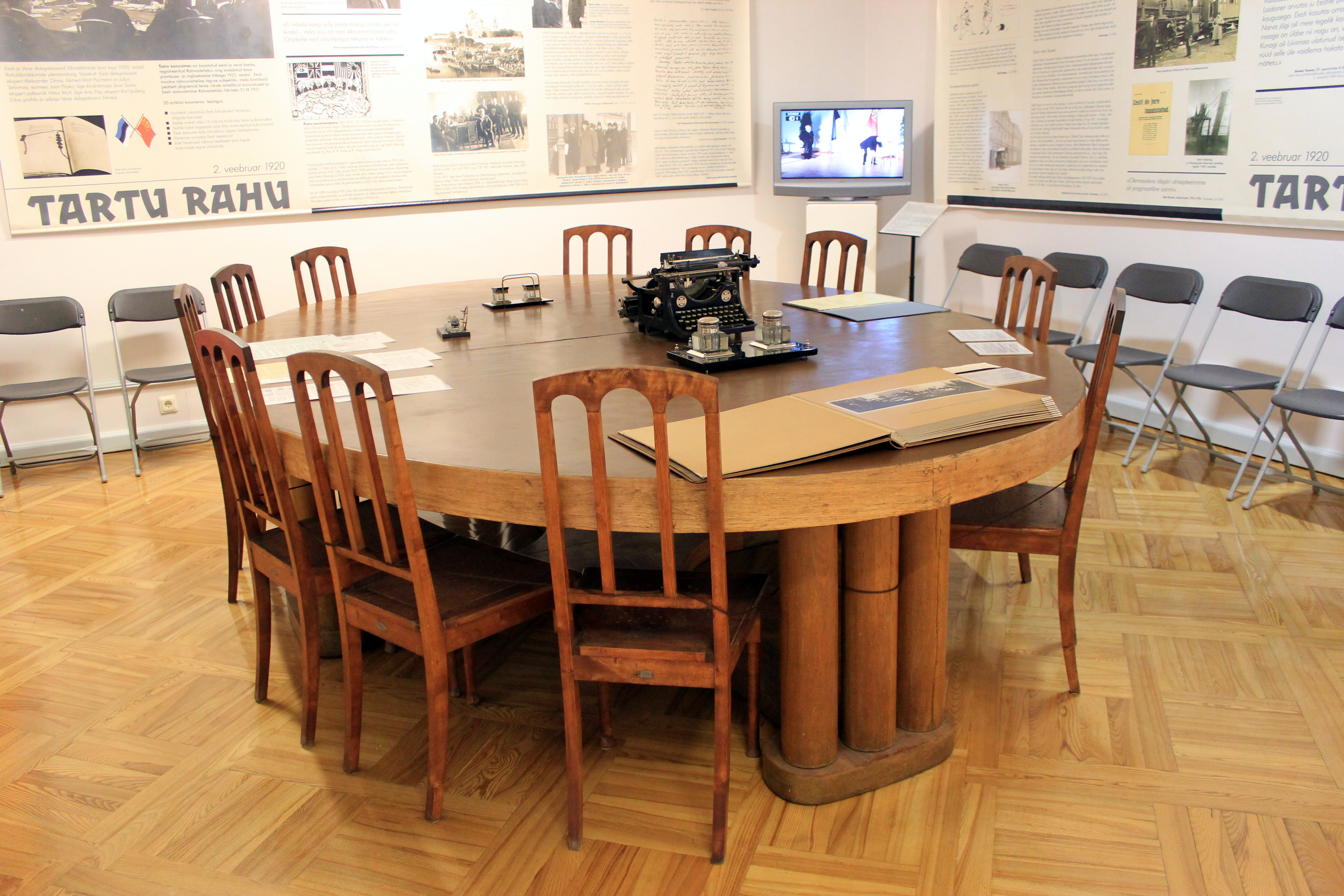 Verhandlungstisch des Friedens von Dorpat 1920 (heute im Tartuer Stadtmuseum).